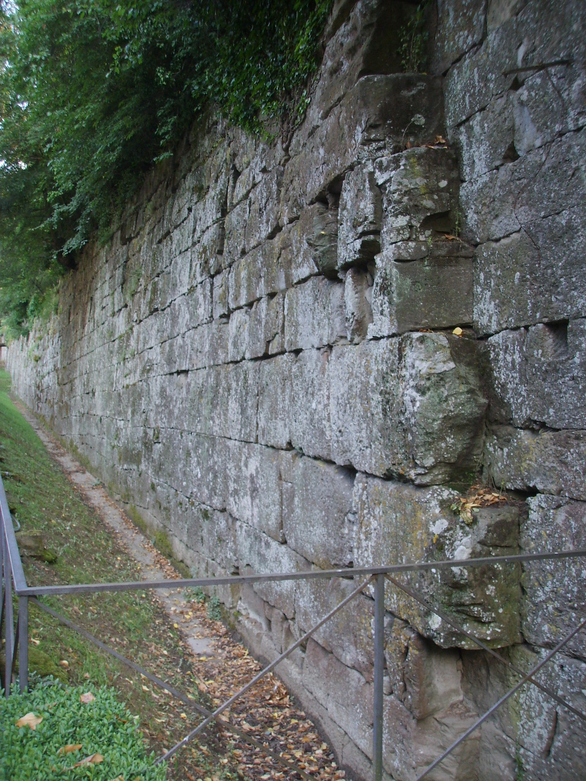 Mura etrusche di fiesole